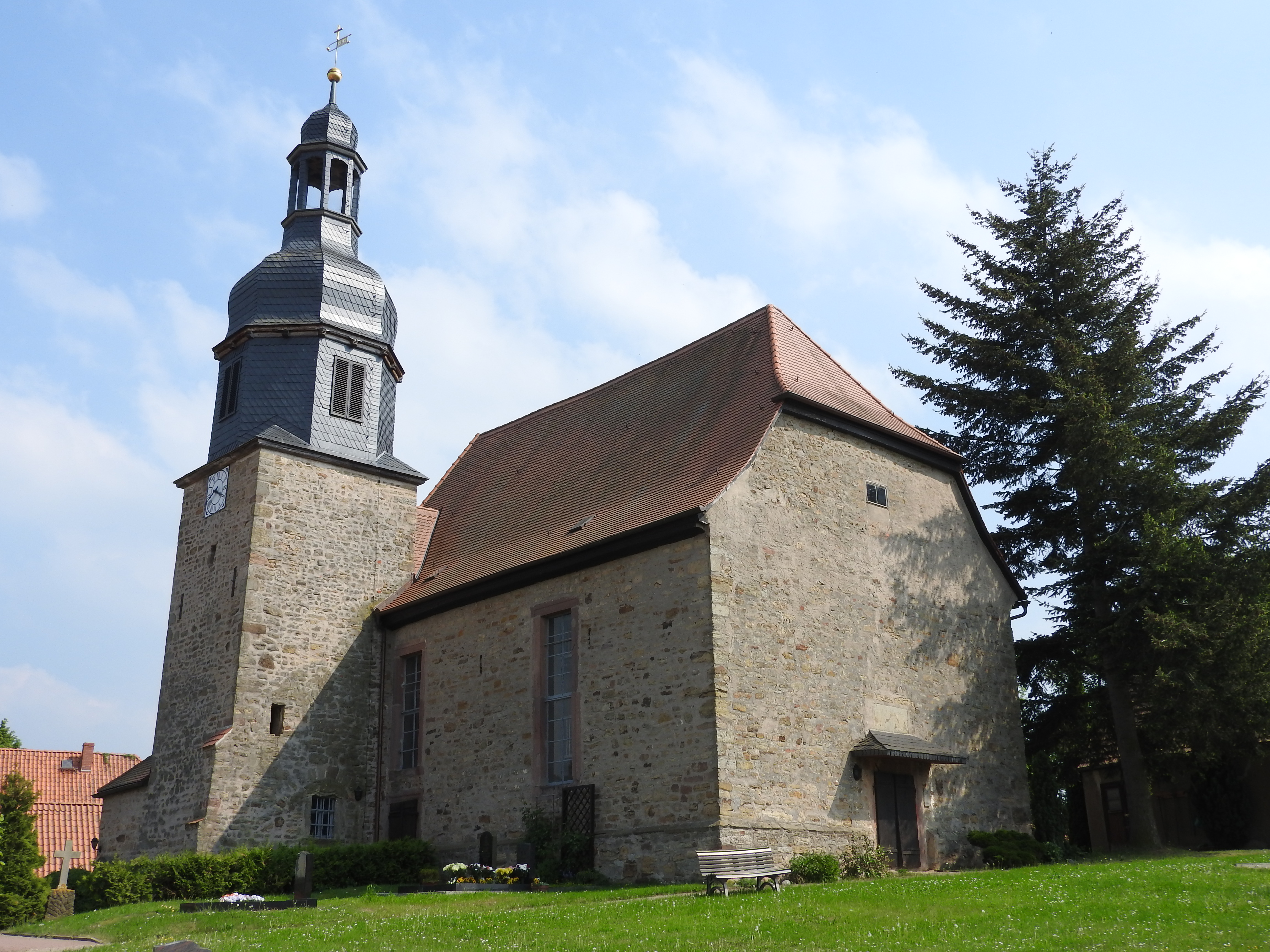 Kirche in Hauteroda, Thüringen